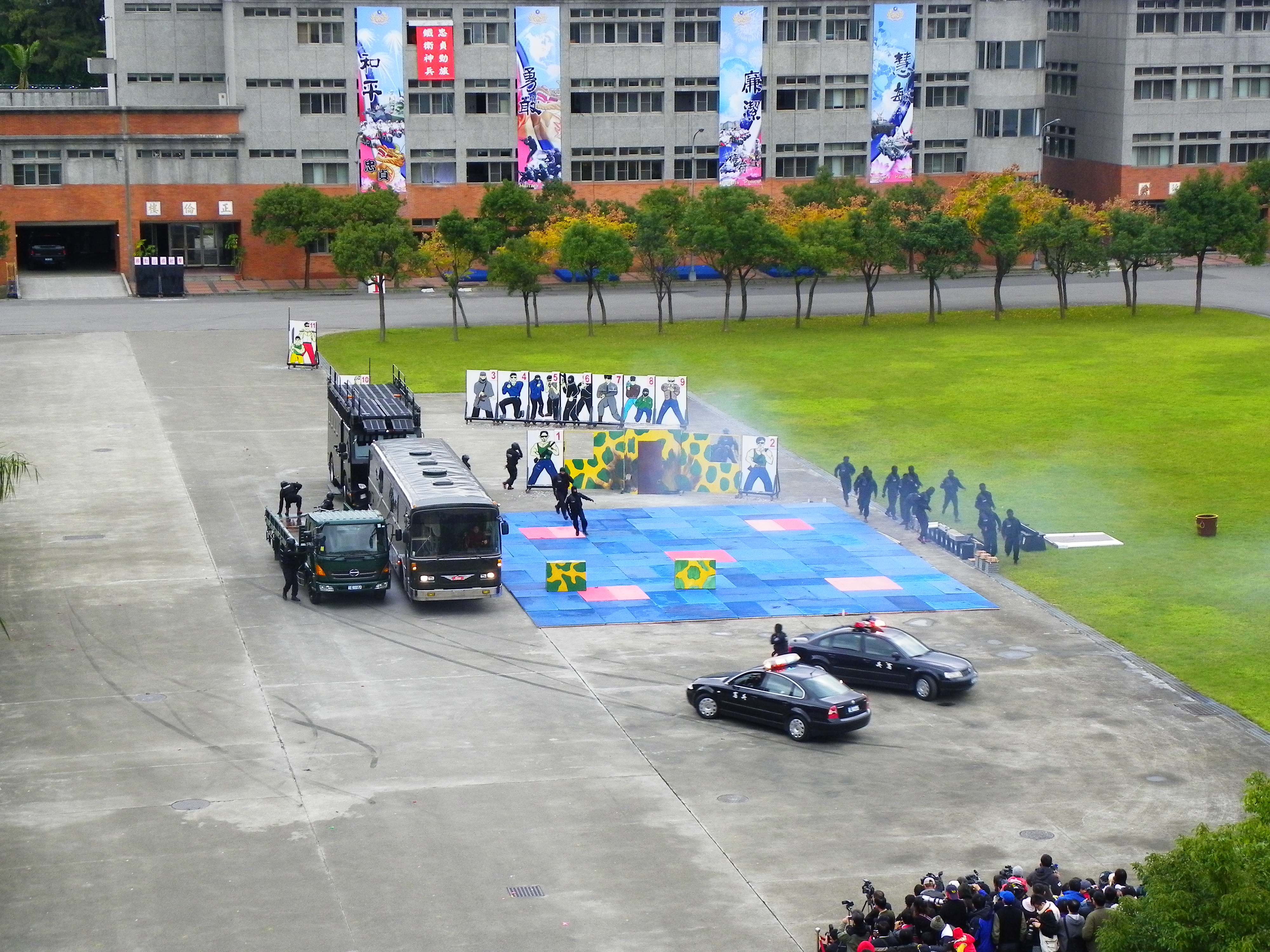 民國一百年憲兵紀念日，憲兵司令部操場操練反劫車突擊演習的憲兵特勤隊。